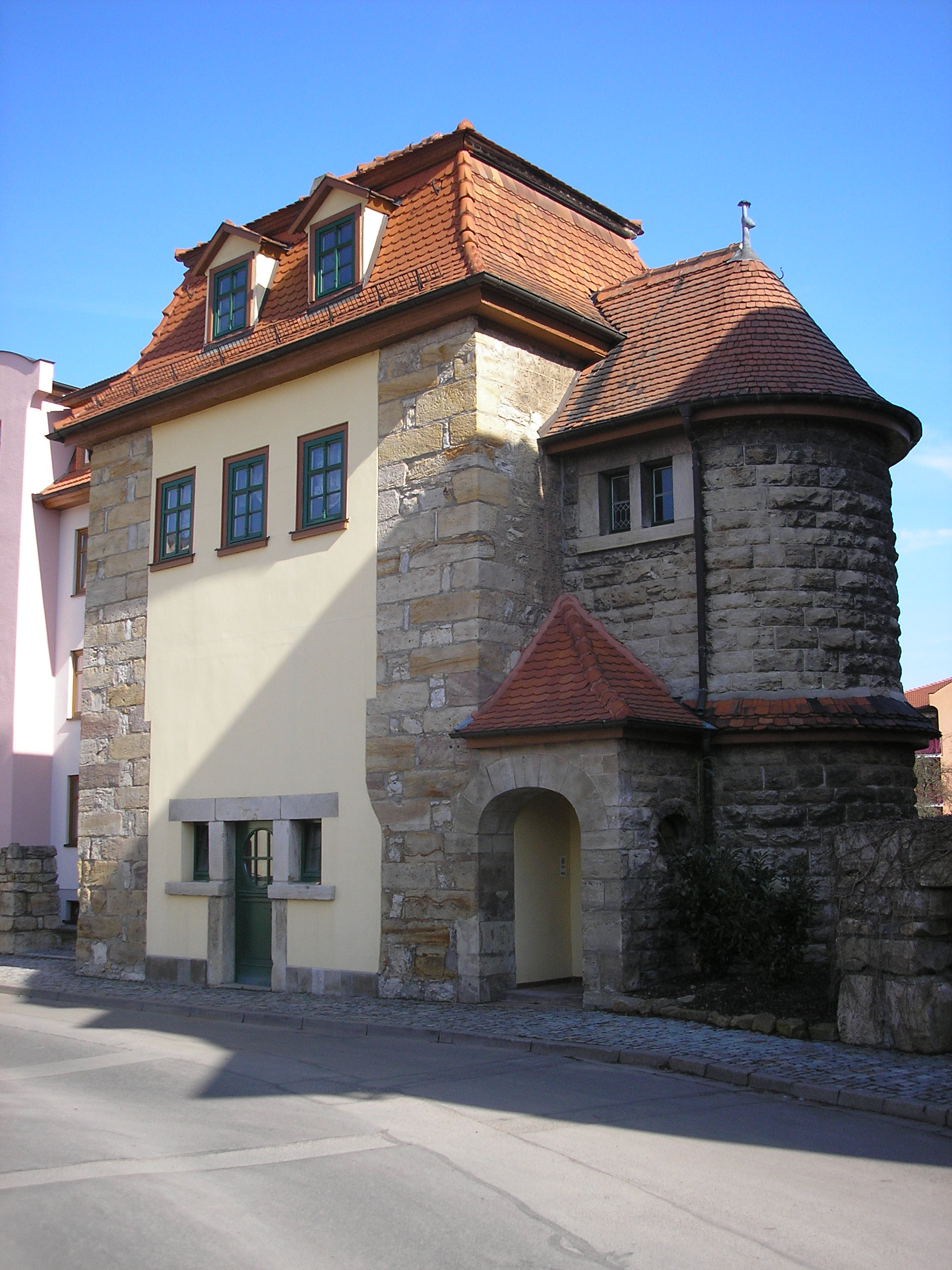 Ein Haus an der Riedmauer in Arnstadt (Thüringen).